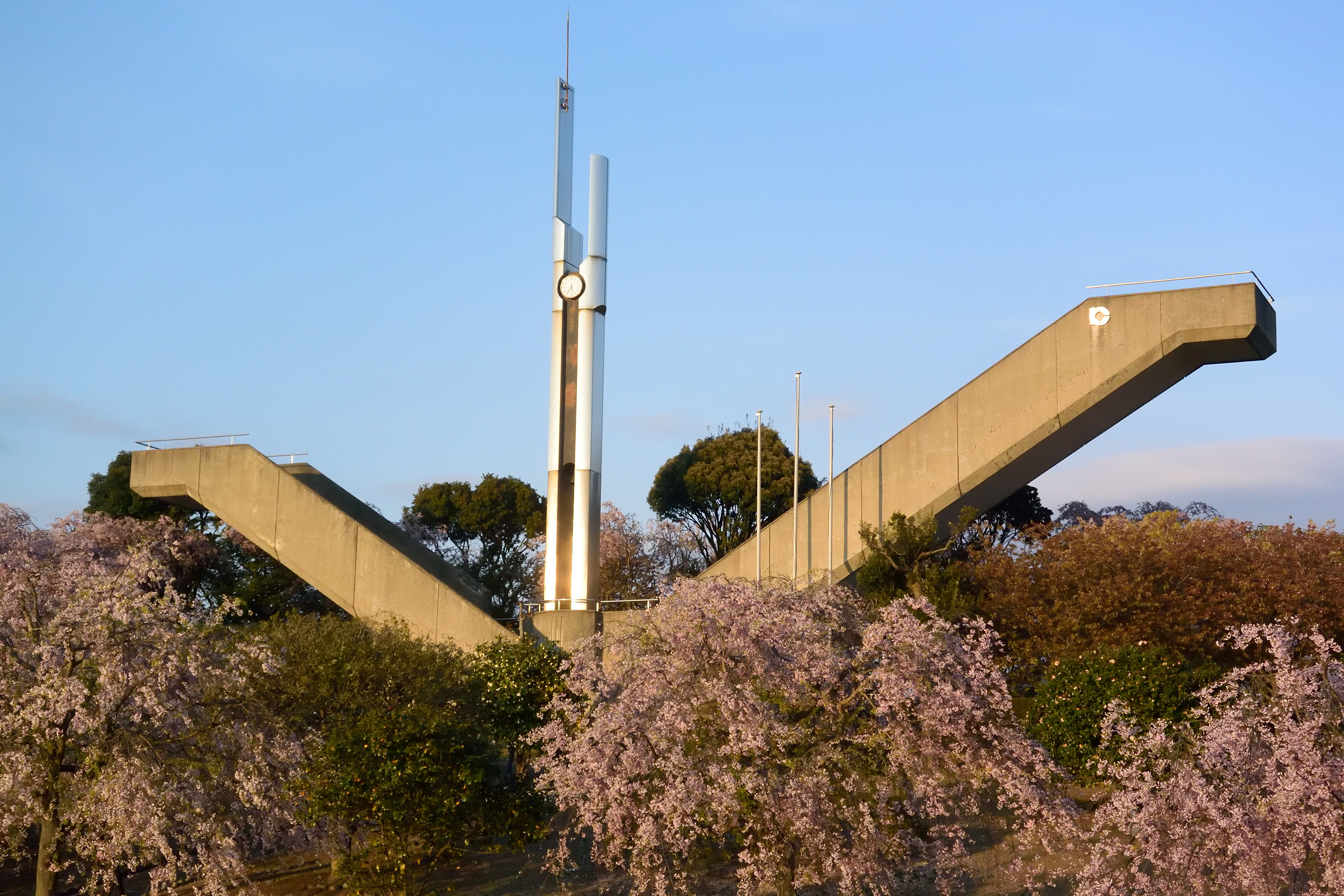 幸田文化広場希望の塔